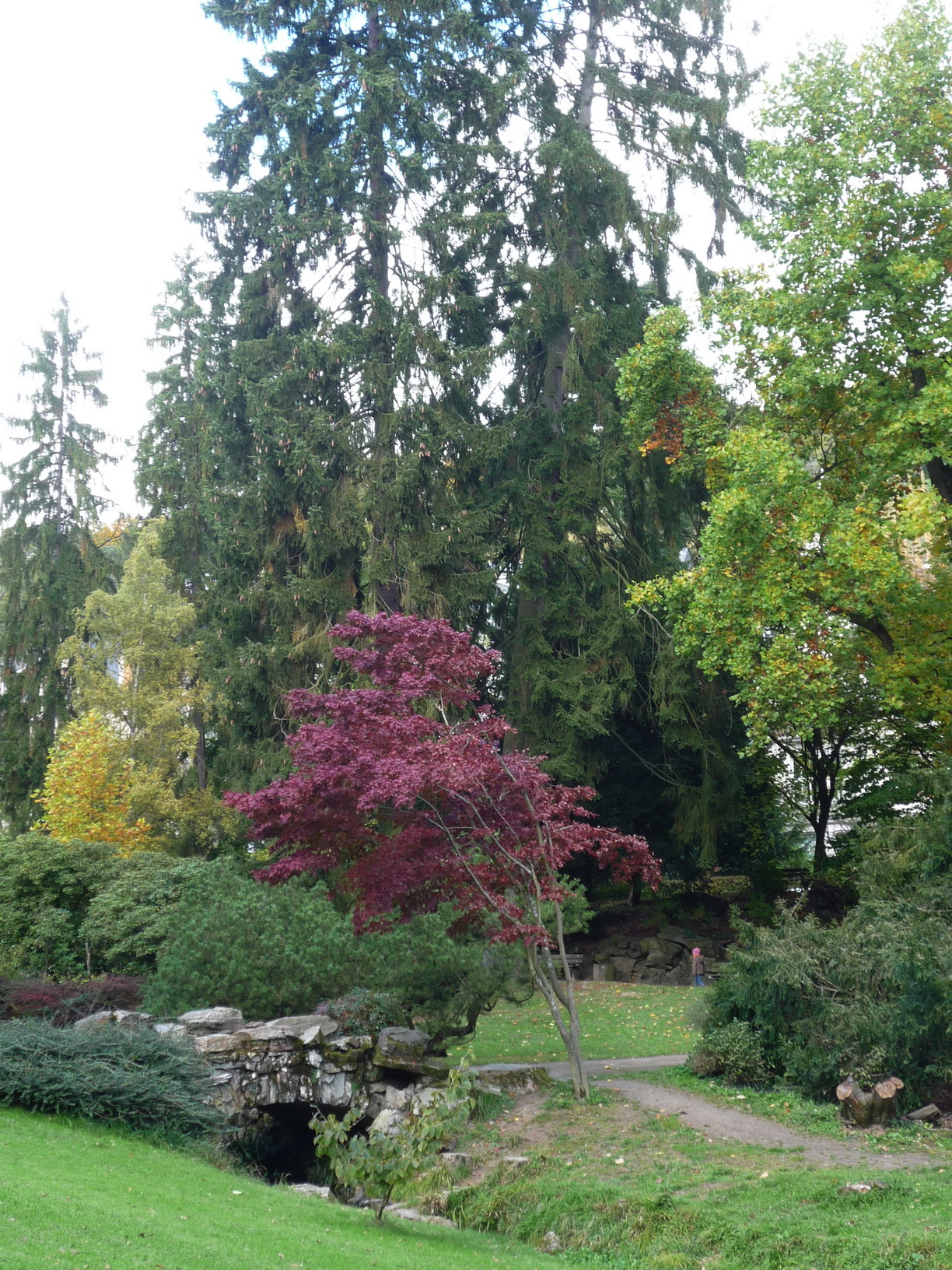 Steinerne Brücke in den Nerotalanlagen in Wiesbaden Nordost